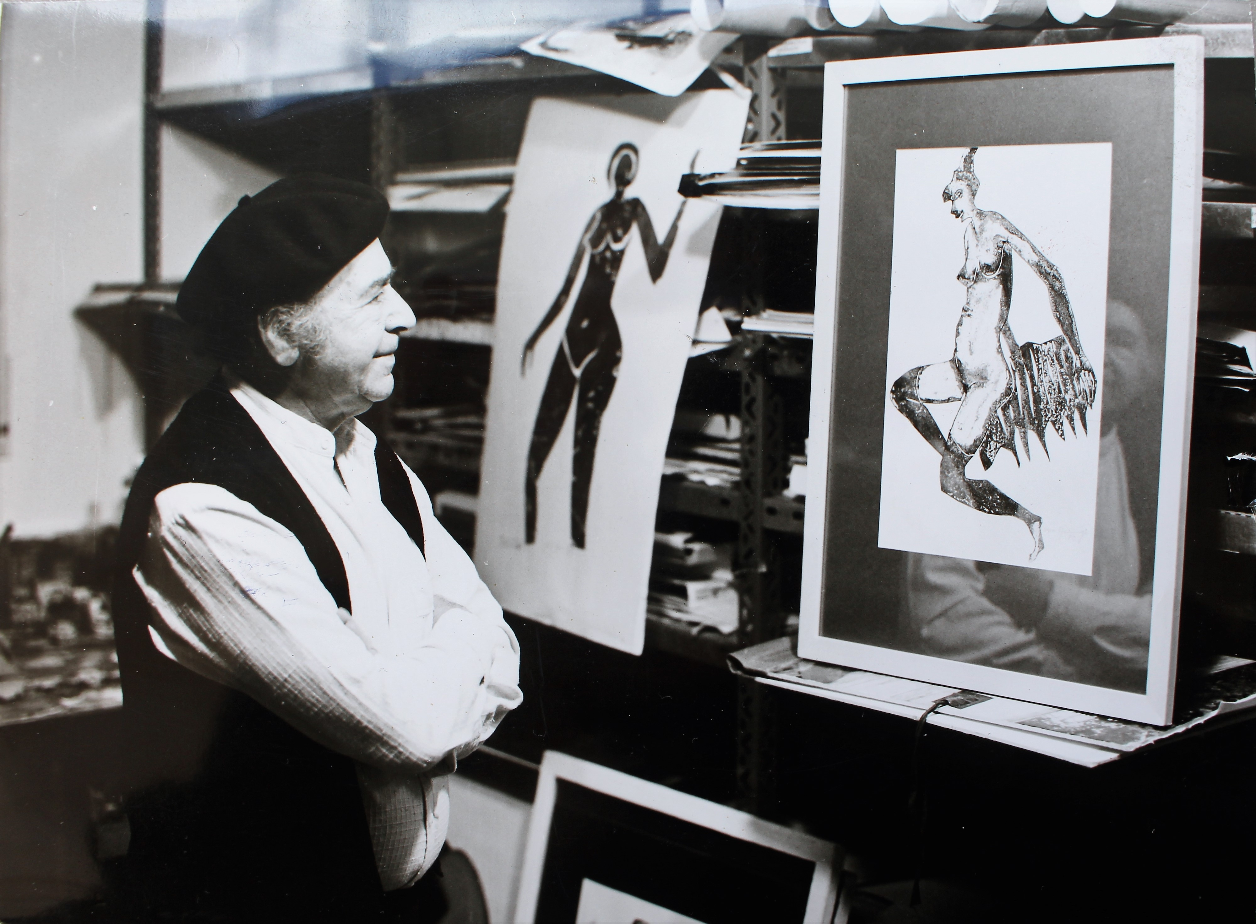 Fotografie Hermann Geigers in seinem Atelier, zwei Werke betrachend